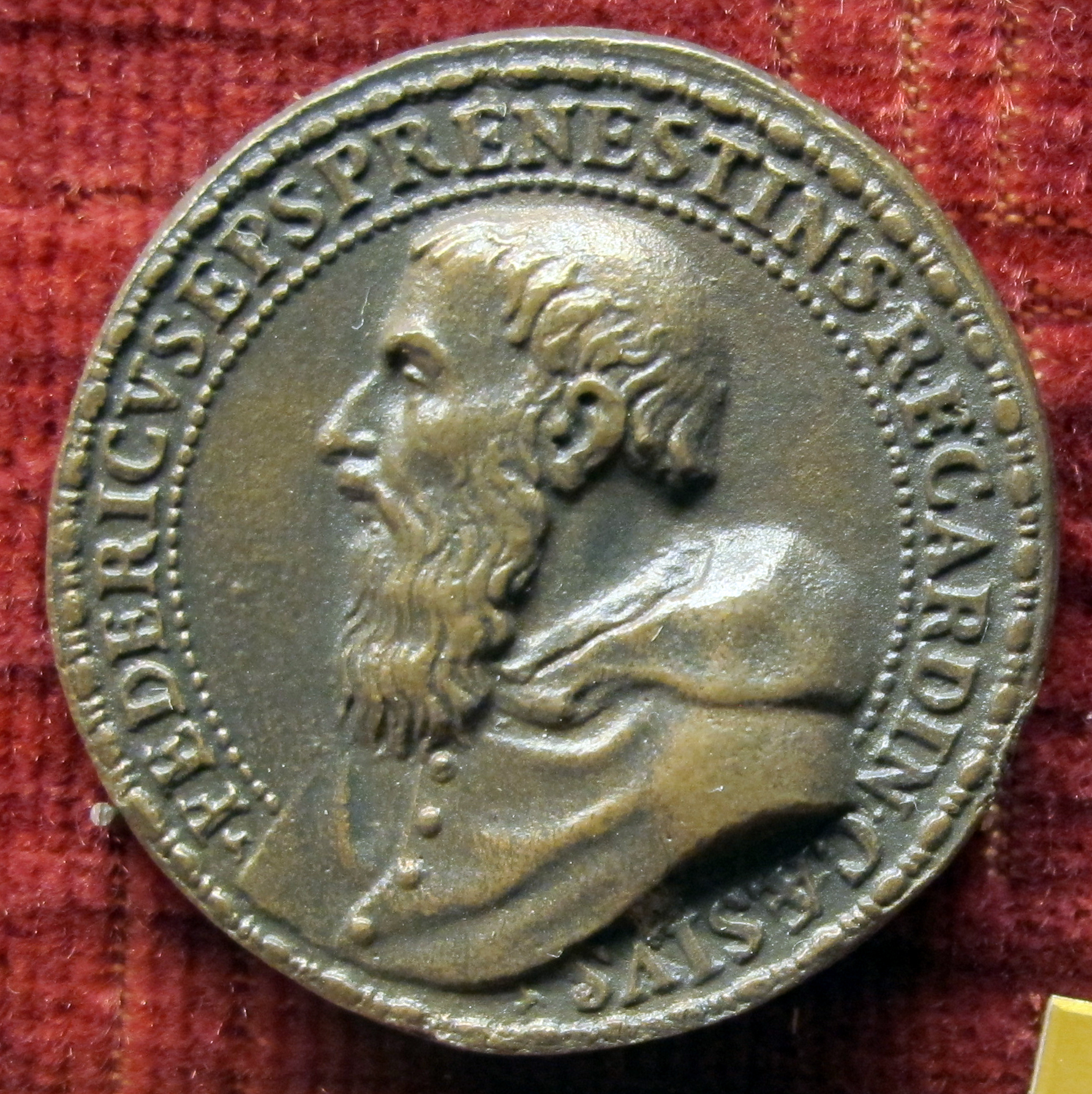 Federico Cesi (cardinale) (1500-1565). Medaglia papale